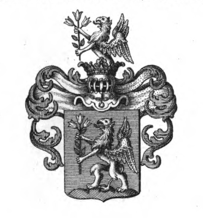 Wappen des Adelsgeschlechts Paur auf Waffenbrunn und Lebendorf